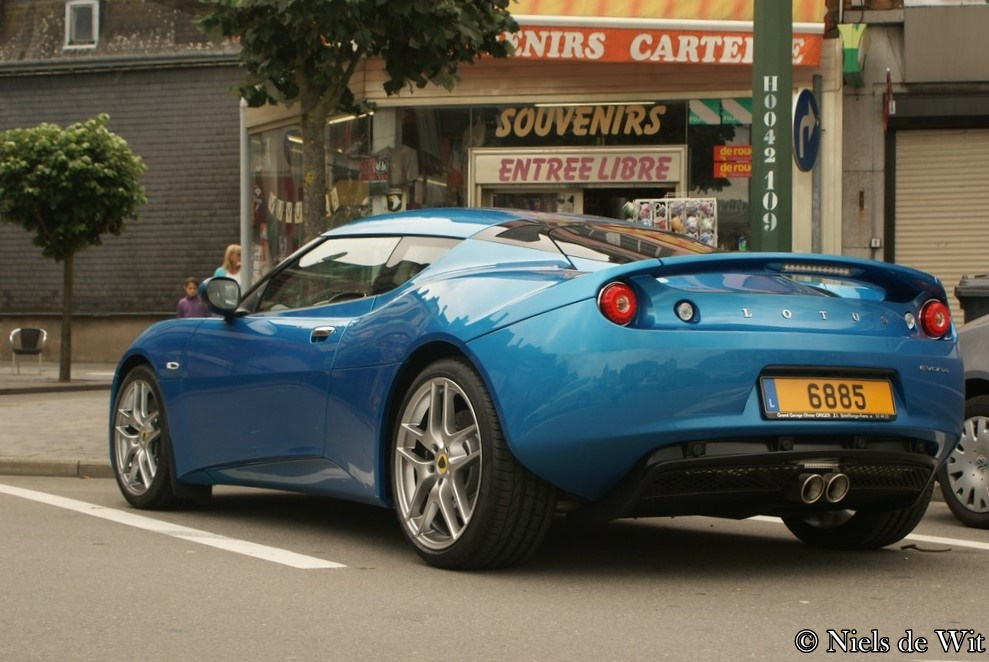 6885 (L) Place Général de Mc Auliffe, Bastogne, Belgium